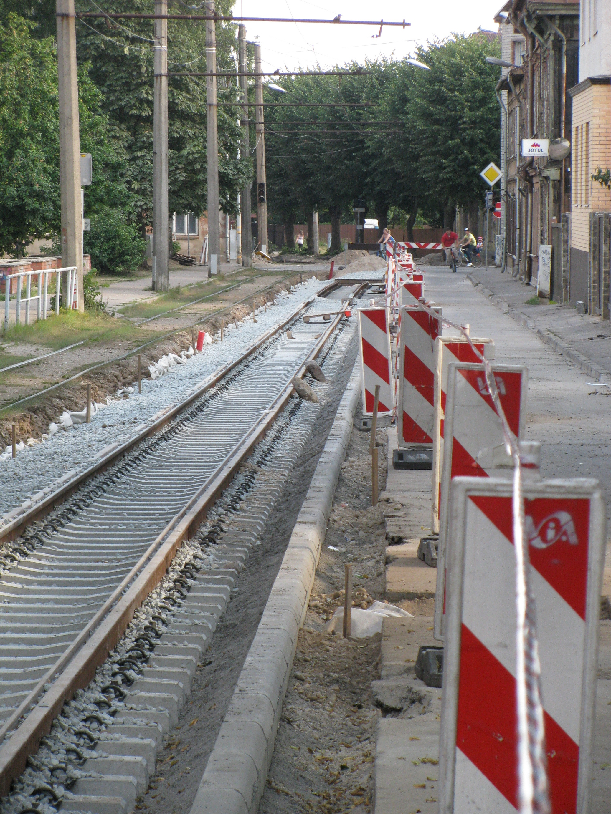 Oprava tramvajové trati v ulici Krišjāņa Valdemāra, Liepāja. Stejné místo jako na tomto obrázku.